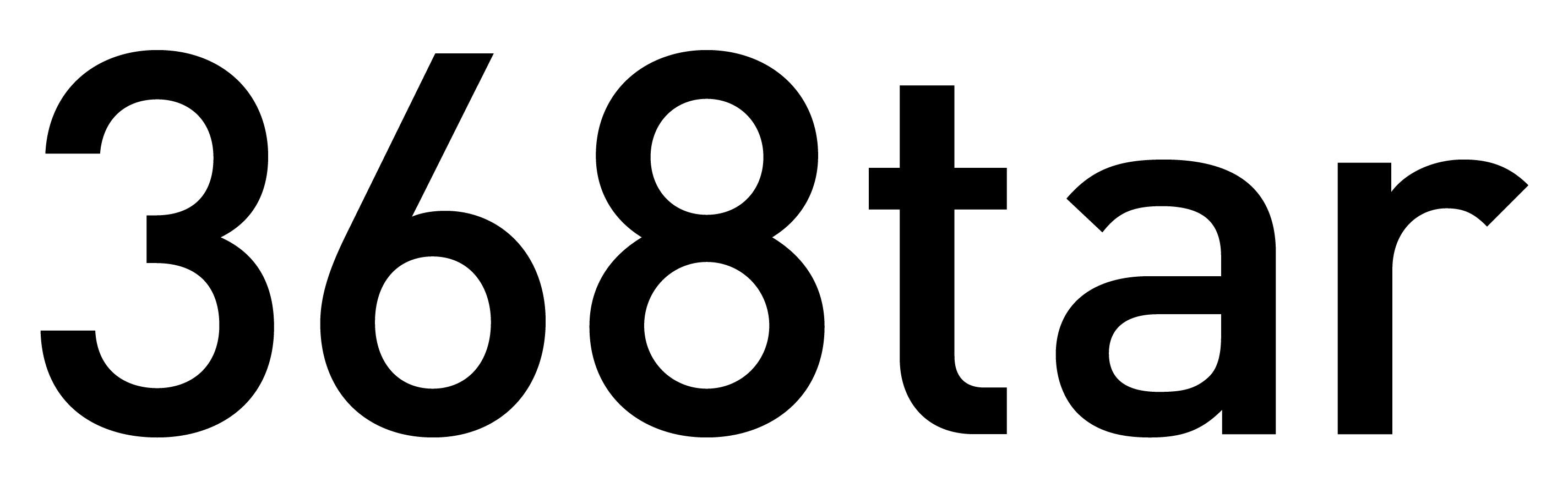 DIN 1451 Mittelschrift – Überarbeitung 1980. Siehe u.a.: P. Krieg: Gestaltung und Ausführung von Verkehrszeichen und Prüfung der Haltbarkeit. In: Straße und Autobahn, 4, 1980, S. 196–200; hier: S. 196.